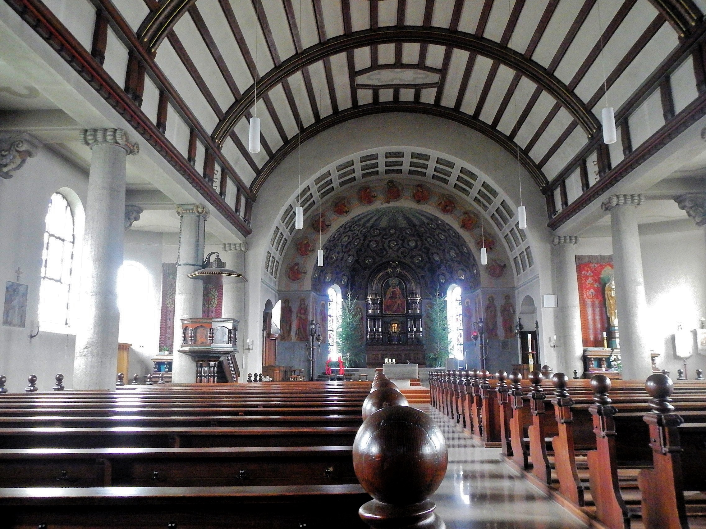 Kirche St. Cyriakus in Strassdorf